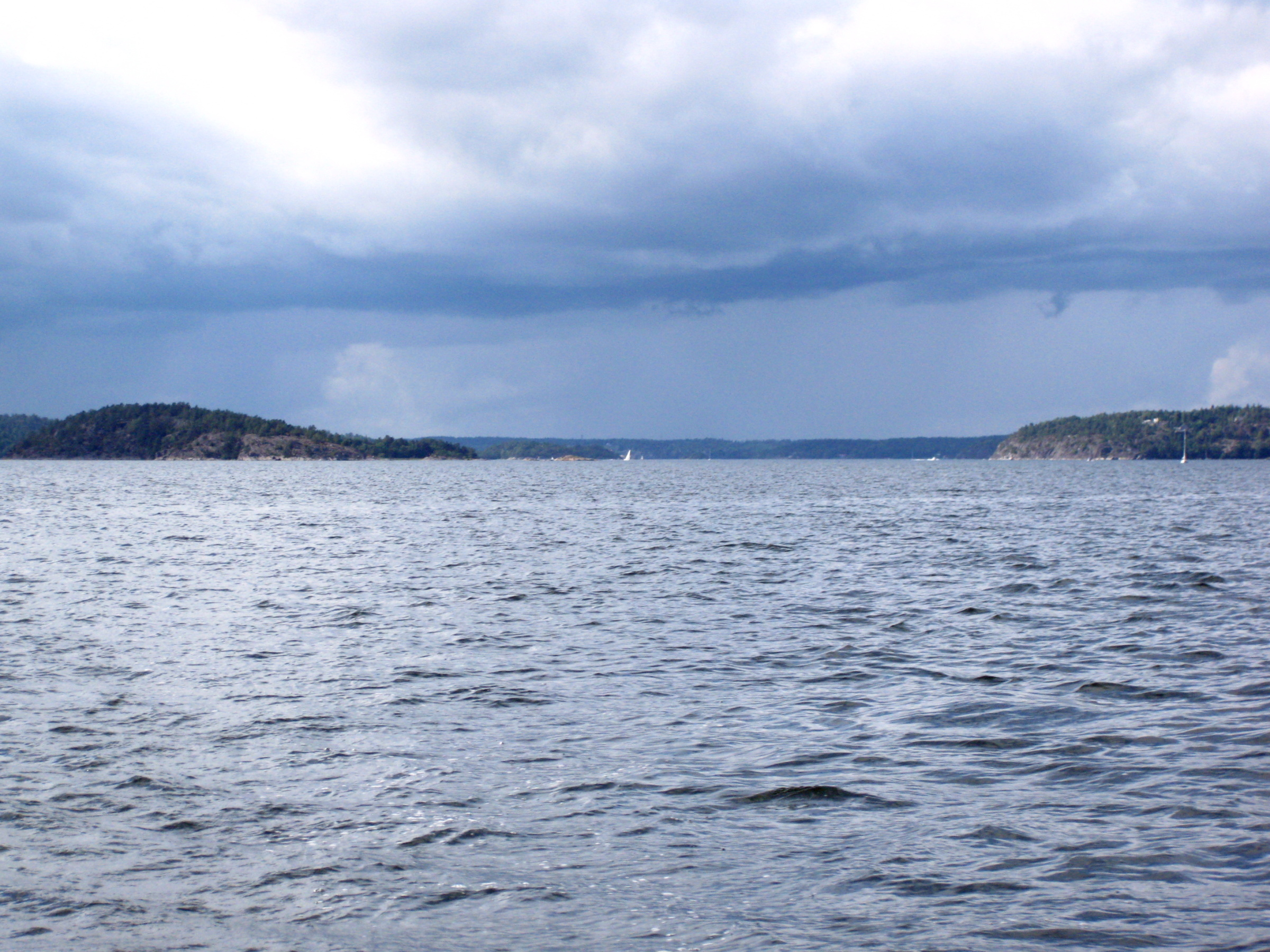 Ingaröfjärden från sydost. Grisselholmen till vänster och Johannesdal på Ingarö till höger.